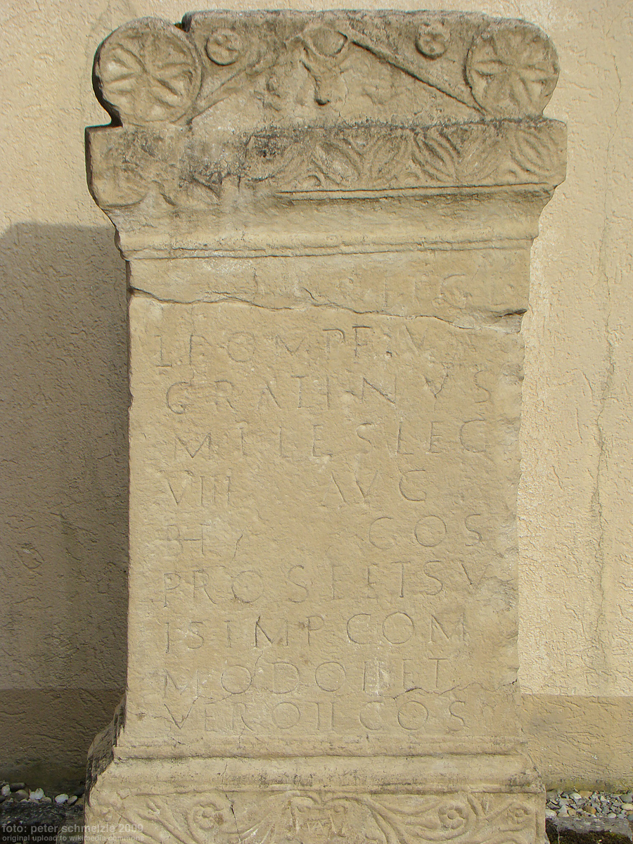 Weihestein des Benefiziariers Lucius Pompeius Gratinus aus dem Jahr 179 n. Chr. Gefunden im antiken Jagsthausen. Abguss im Römerbad Jagsthausen.